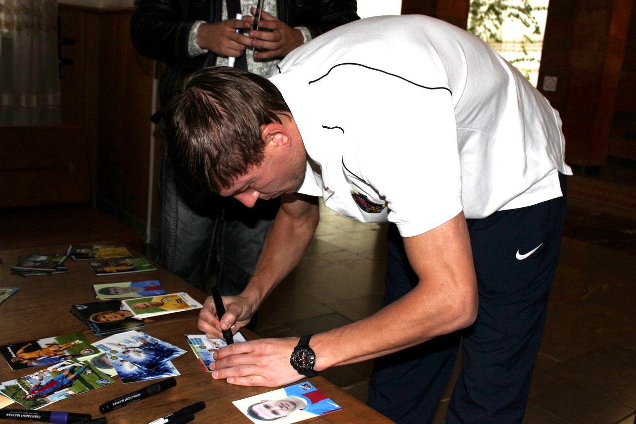 Максим Шацких подписывает фото фанатам в Днепропетровске.